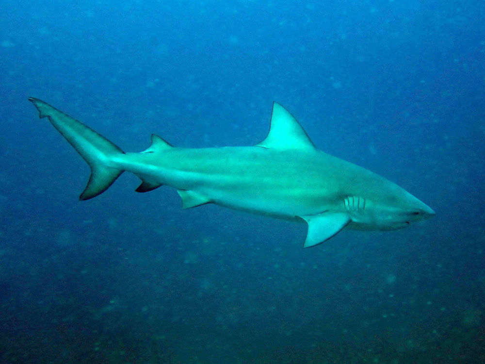 Carcharhinus leucas, Koh Phangan, Tailandia